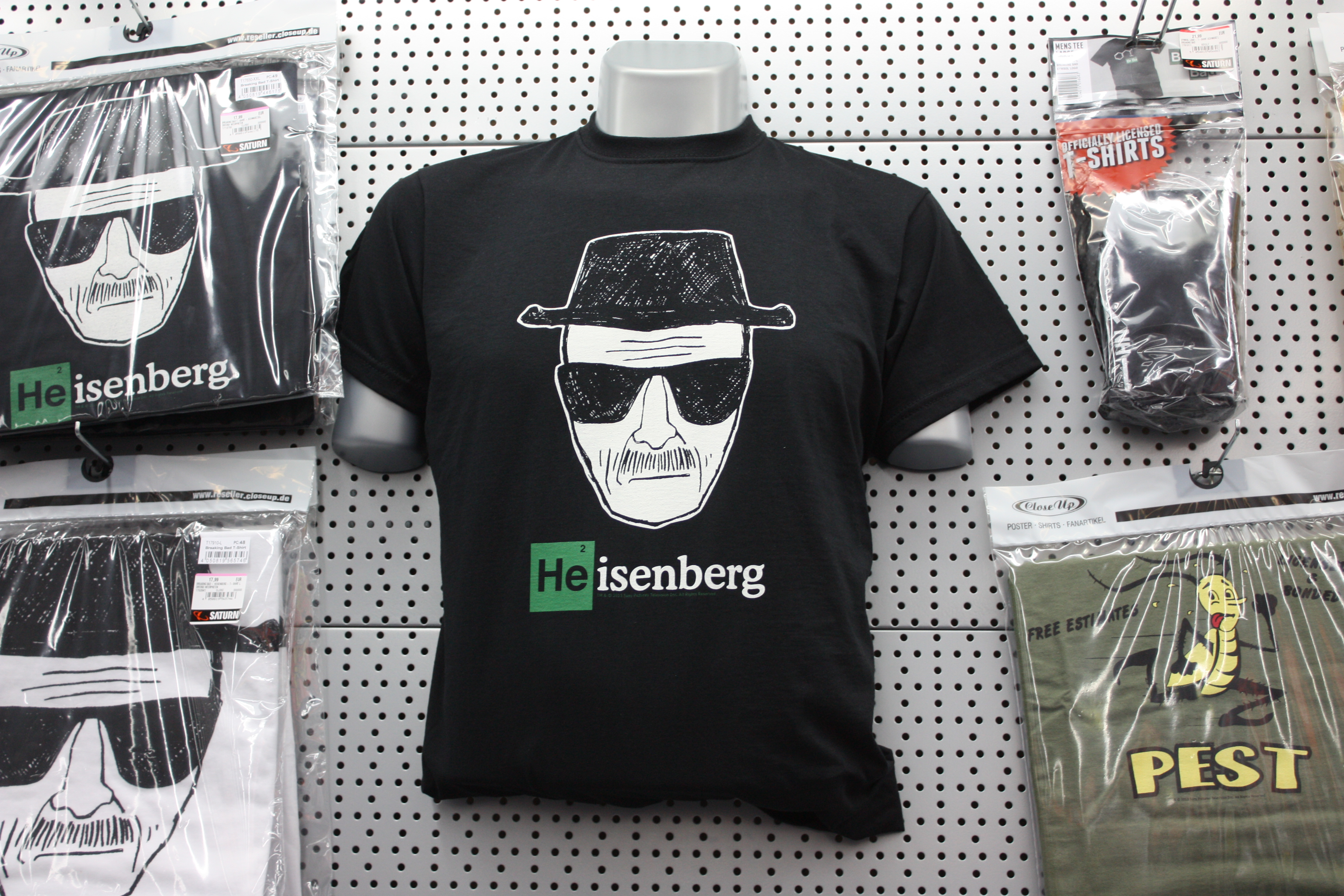 Berlin